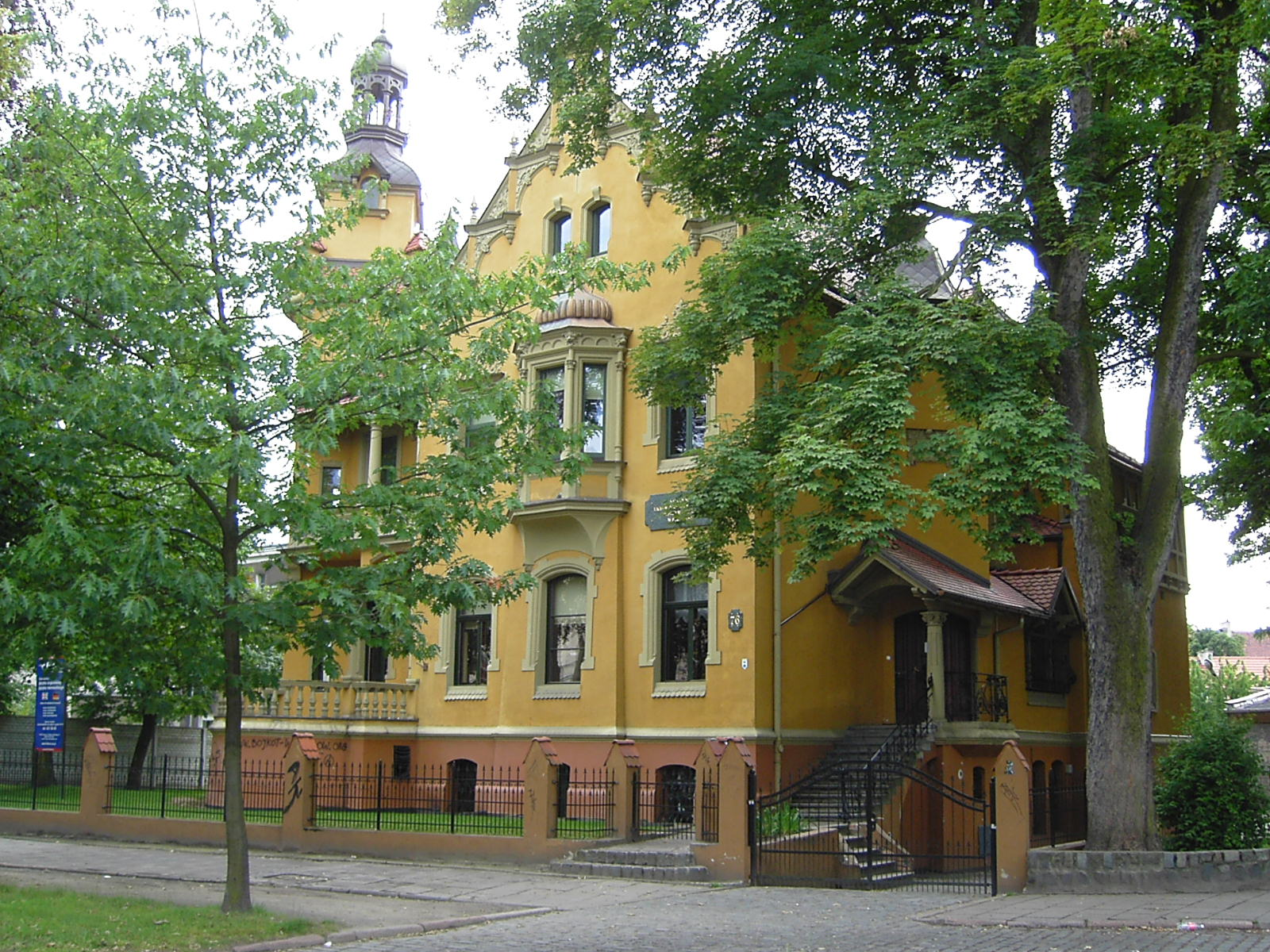 Willa przy ulicy Wojska Polskiego 76 w drugiej połowie lat 40 XX w. znajdował się Wojskowy Sąd Rejonowy w Szczecinie